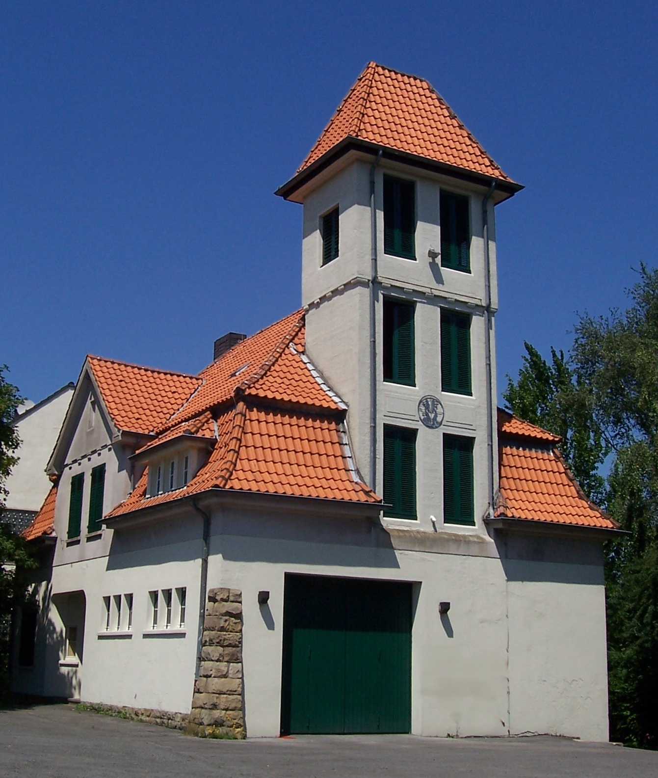 Gerätehaus des Löschzug 15, Fire station in Dortmund-Kirchhörde, Germany